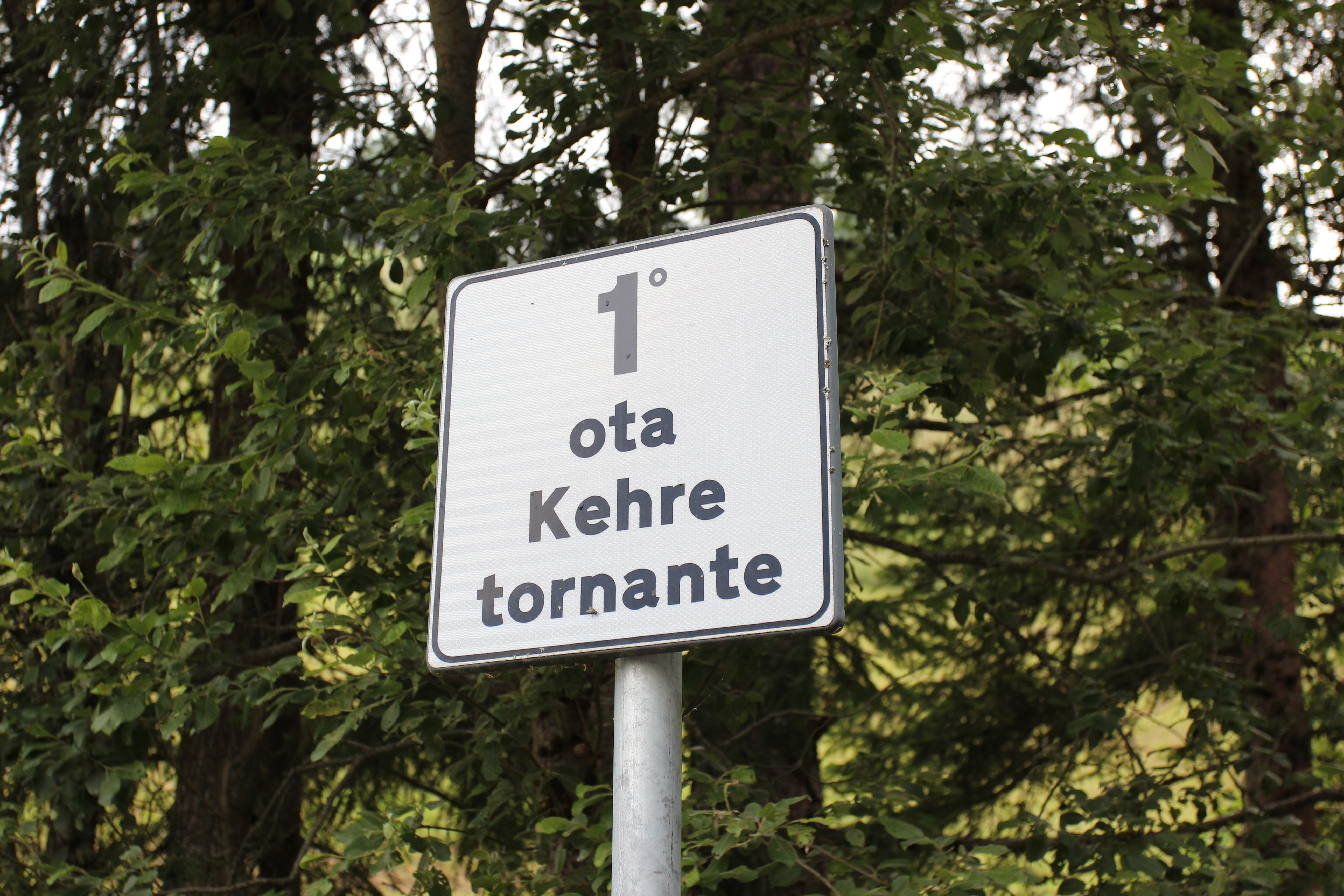 Mehrsprachiges Straßenschild / Dreisprachiges Straßenschild in Südtirol mit Ladinisch, Deutsch und Italienisch.